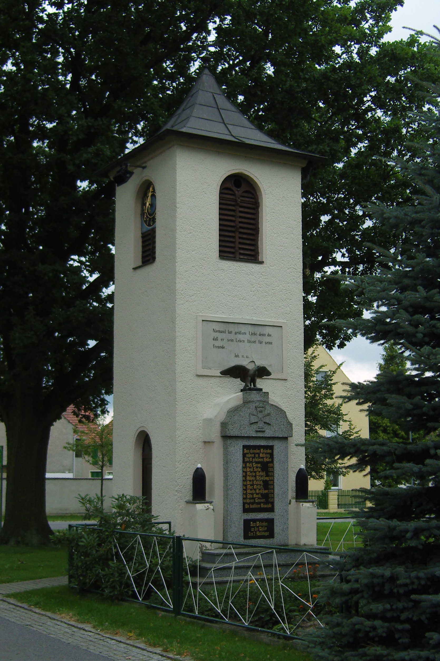 Glockenturm auf dem Dorfplatz in Sella einem Ortsteil von Grünewald Am Glockenturm befindet sich ein Kriegerdenkmal für die Gefallenen des Ersten Weltkriegs